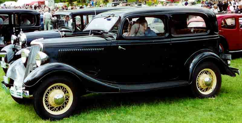 Ford Model 40 700 Standard Tudor Sedan 1934